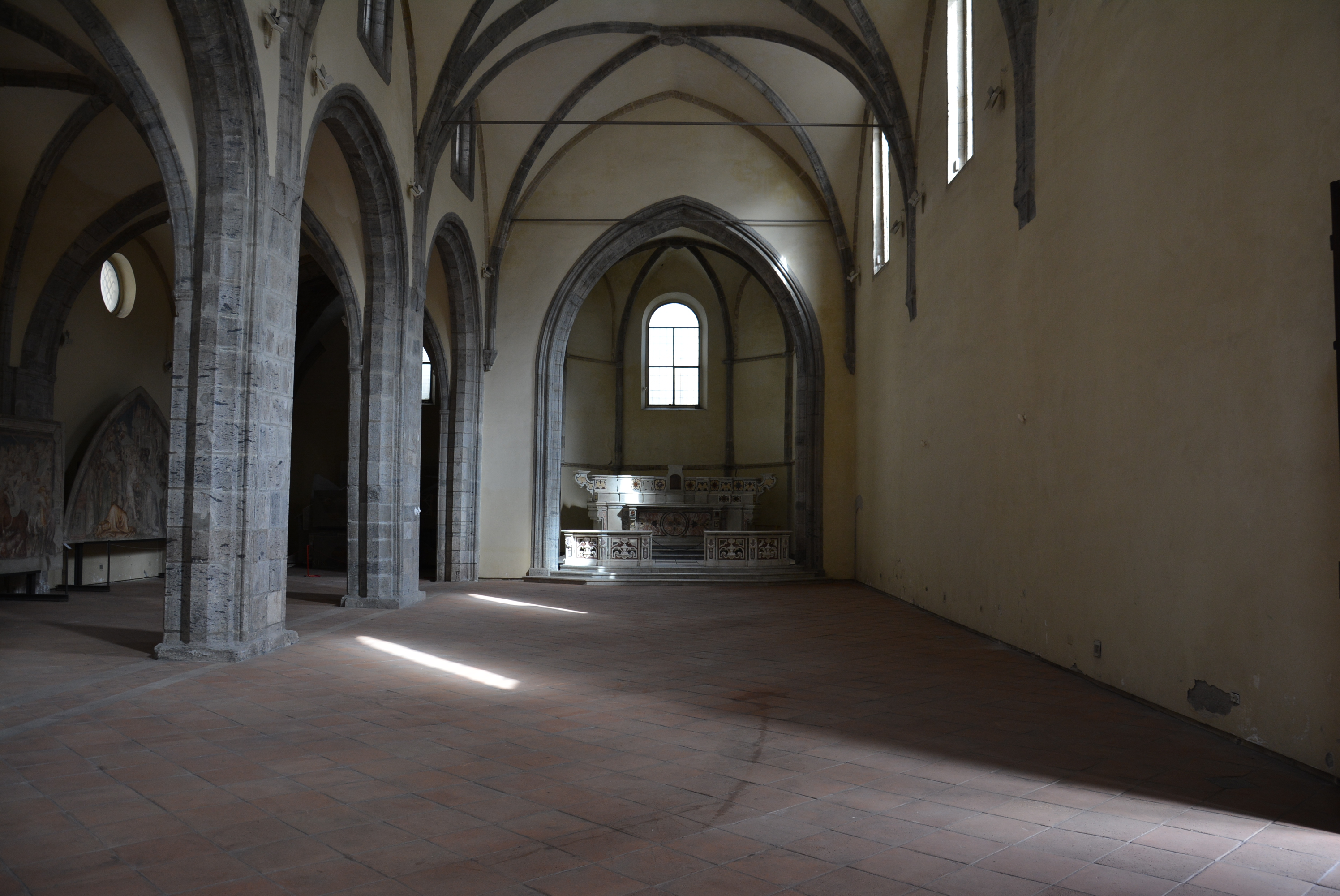 Chiesa di Santa Maria Incoronata a Napoli